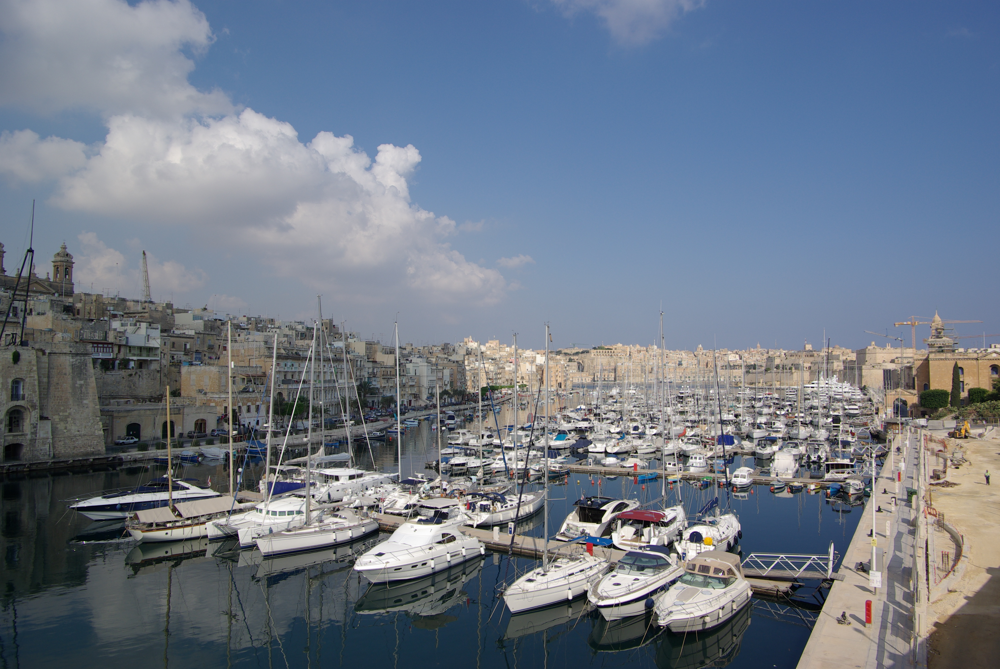 Malta, Hafen zwischen Senglea und Vittoriosa